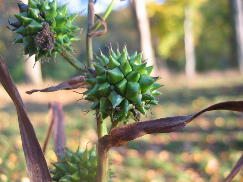 Frucht des Ästigen Igelkolbens Sparganium erectum